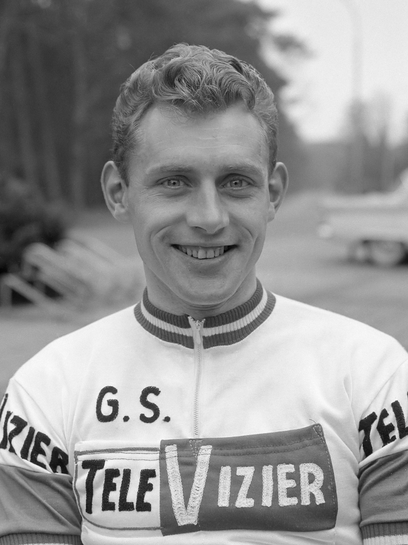 Nederlandse wielerploeg aan Tour de France 1964 gepresenteerd, (kop) Henk Nijdam 23 maart 1964